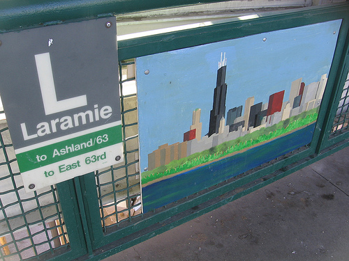 Photo de la station Laramie sur la ligne verte